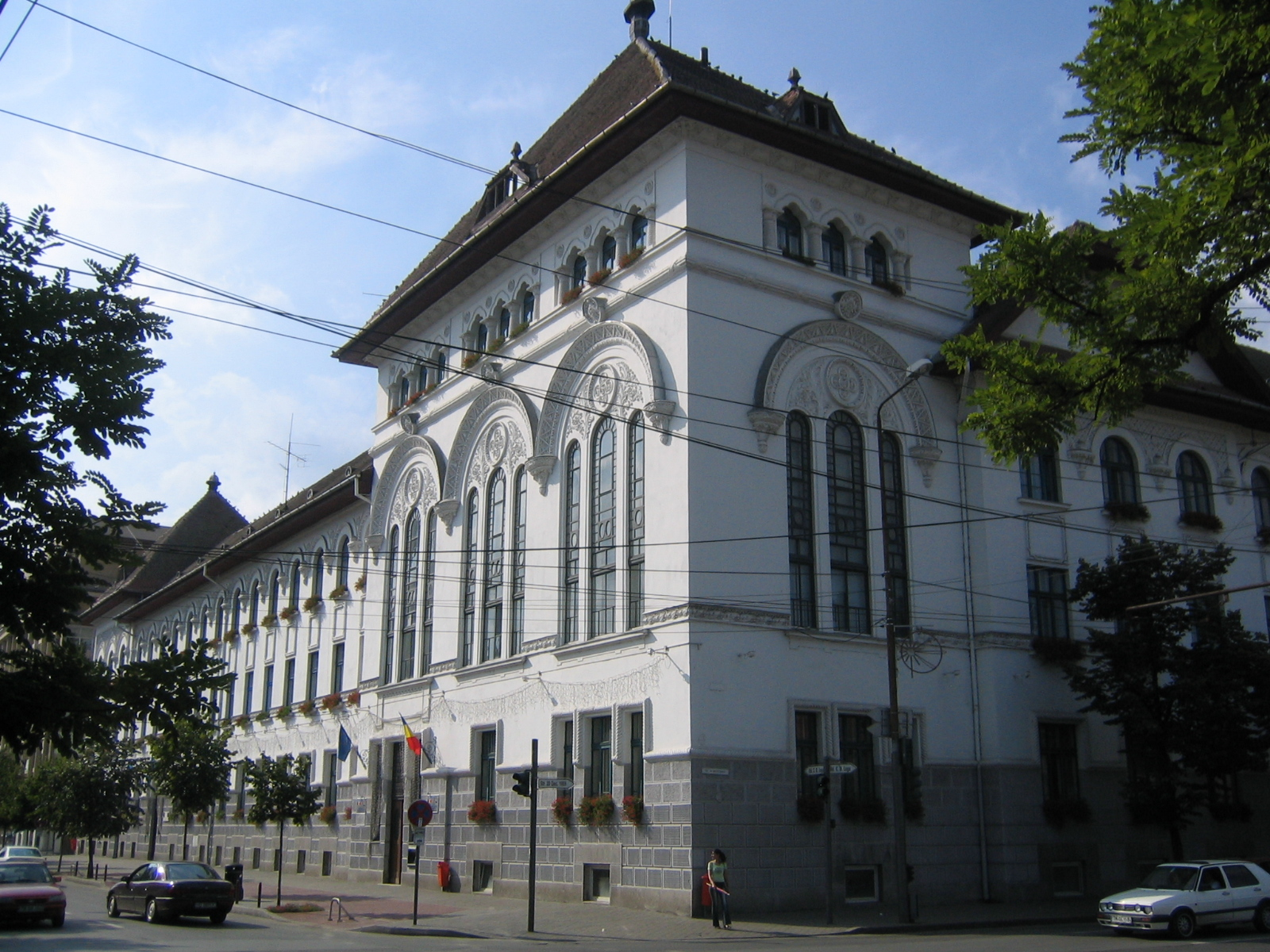 Primaria Timisoara.